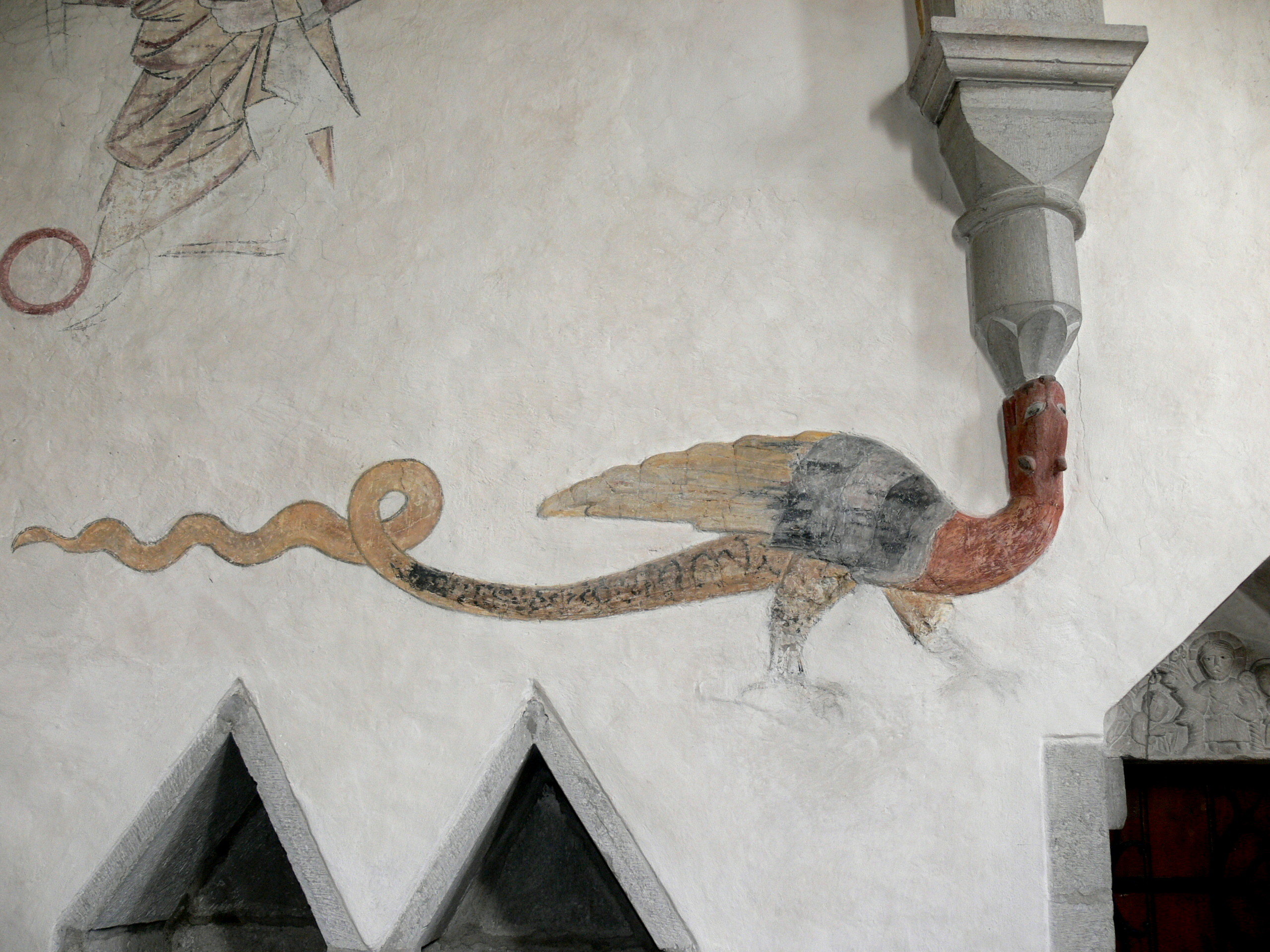 Lärbro kyrka auf Gotland. Mittelalterliche Wandmalerei: Greif